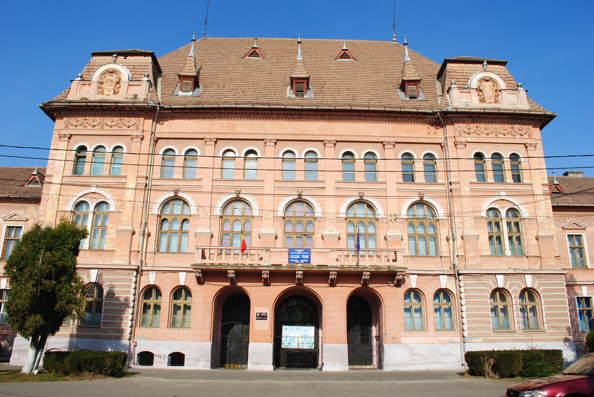 Fostul sediu al Comitatului Tarnava Mica, 1878